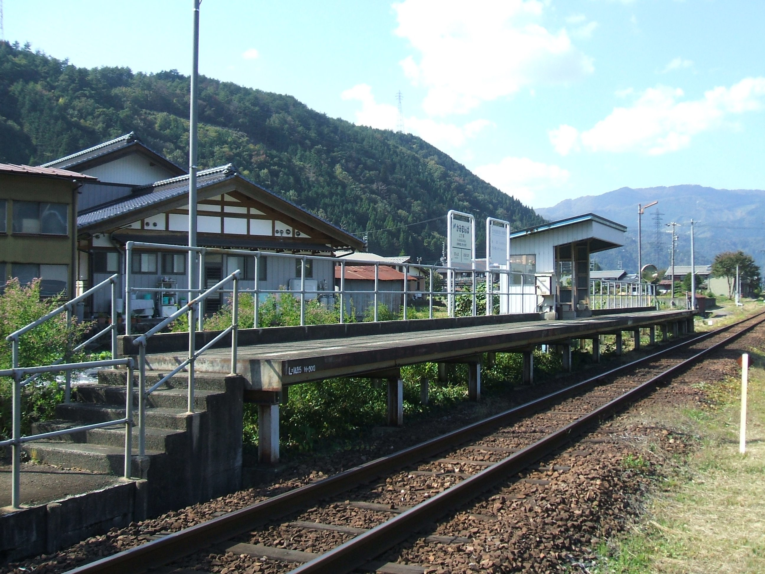 上万場駅